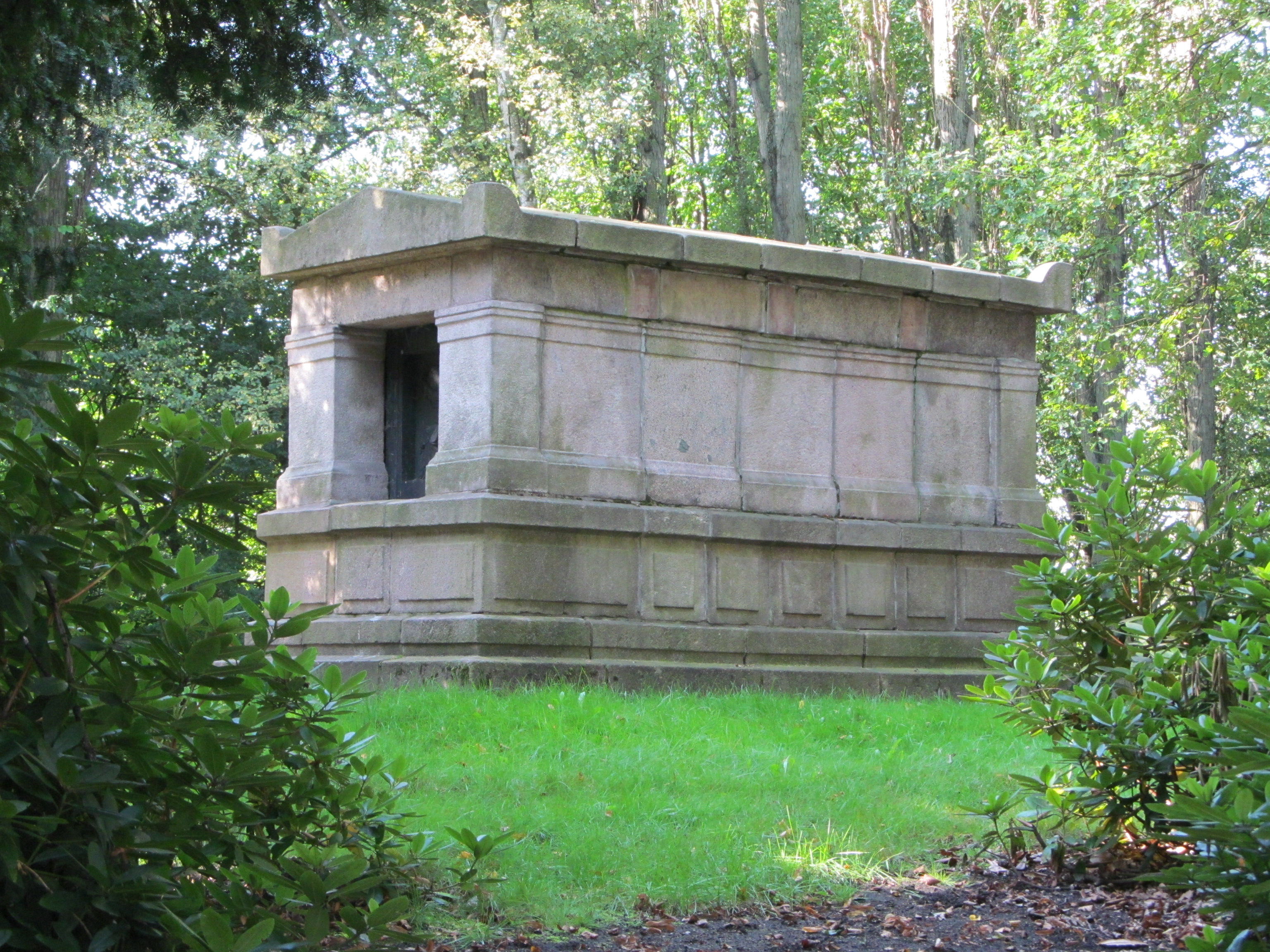 Sieveking-Mausoleum auf dem Alten Hammer Friedhof in Hamburg-Hamm, Ansicht von Nordosten